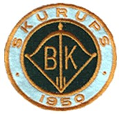 Klubbens logotype